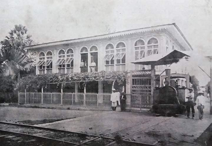 Antigua Casa de Hacienda del desaparecido Ingenio La Matilde (Chobo) de propiedad de Homero Morla Mendoza. (Aporte Victor H. Vicuña)